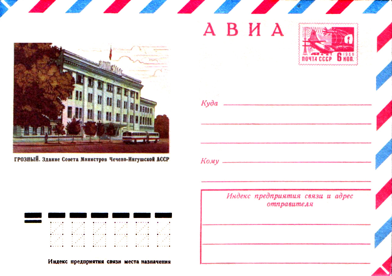 Грозный. Здание Совета министров Чечено-Ингушской АССР. Конверт СССР. Авиа. 1975 год